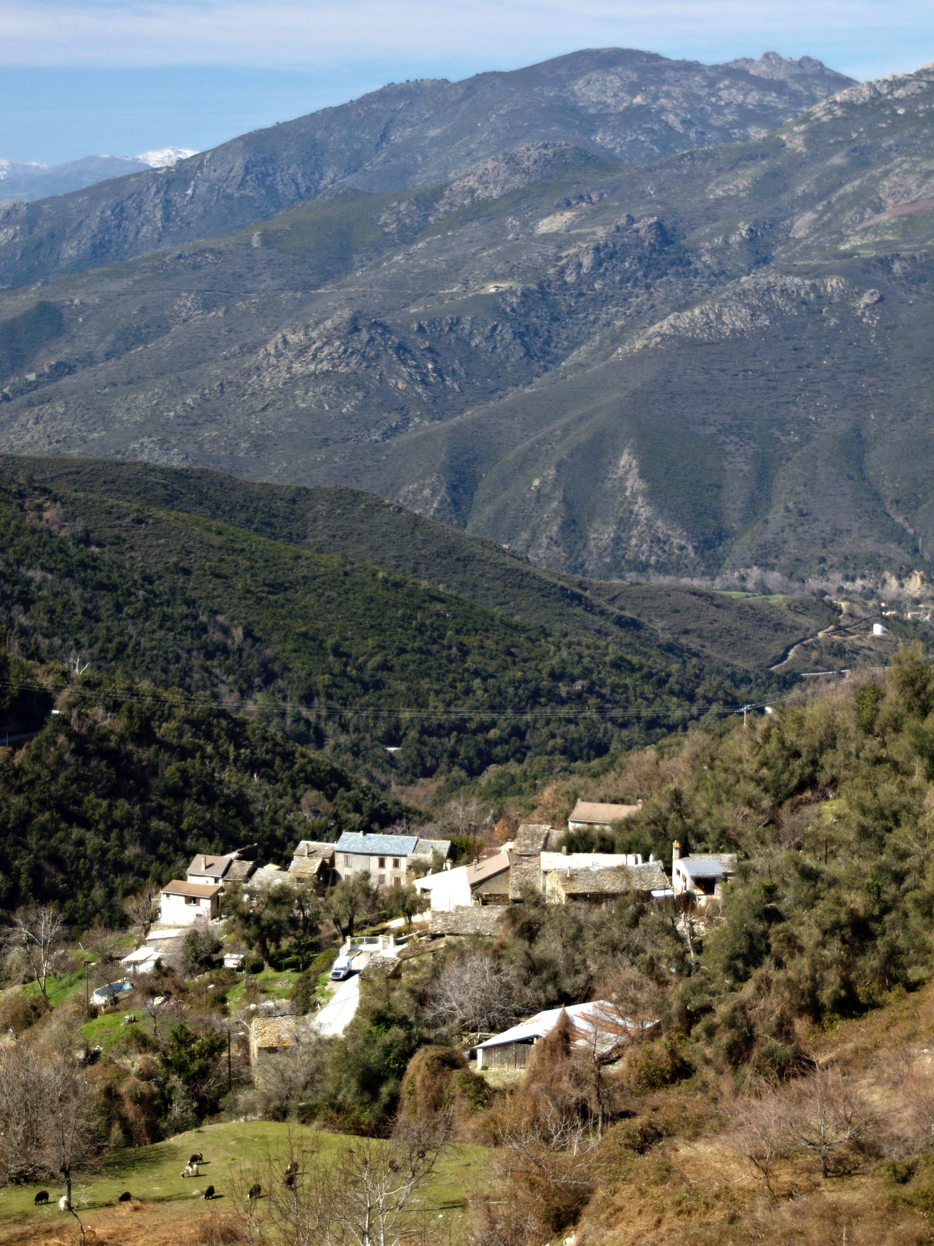 Castello-di-Rostino, Rustinu (Corse) - Hameau de Piano